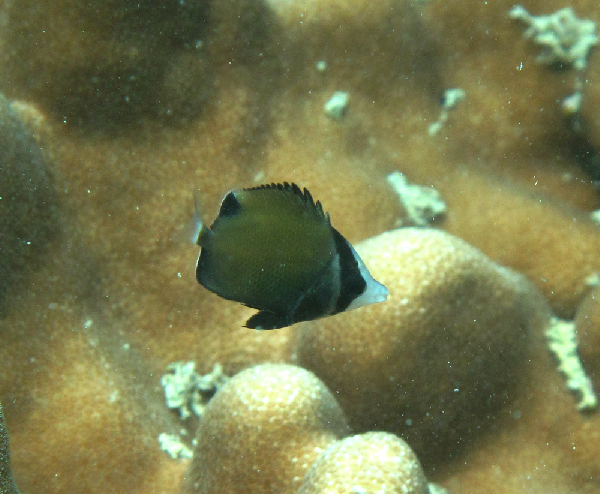 Chaetodon nigropunctatus juvenil, en isla Qeshm, Irán.